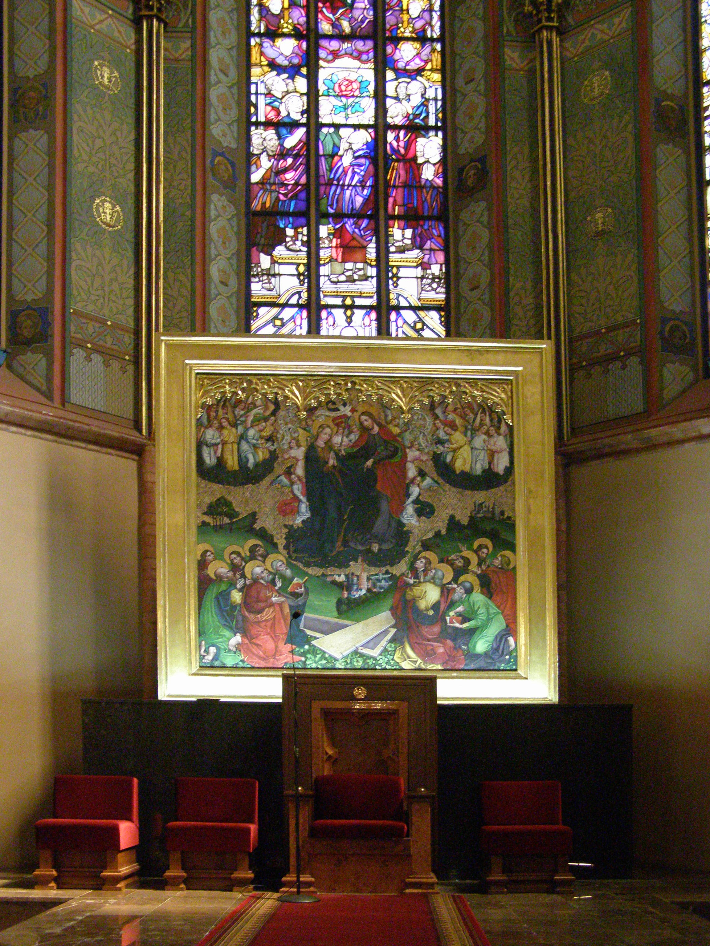 Katedra włocławska - katedra biskupia